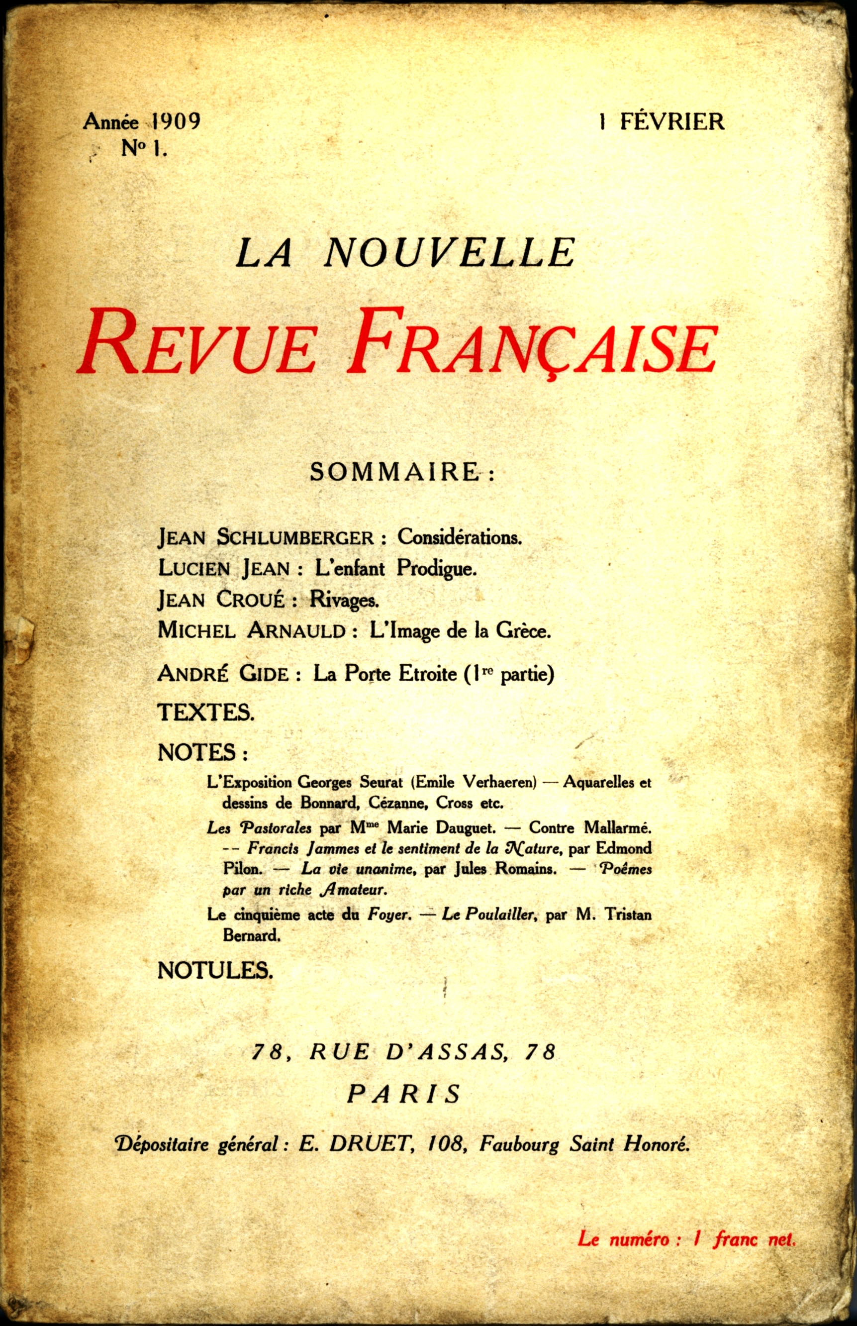 Portada del primer número de La Nouvelle Revue Française, febrero 1909